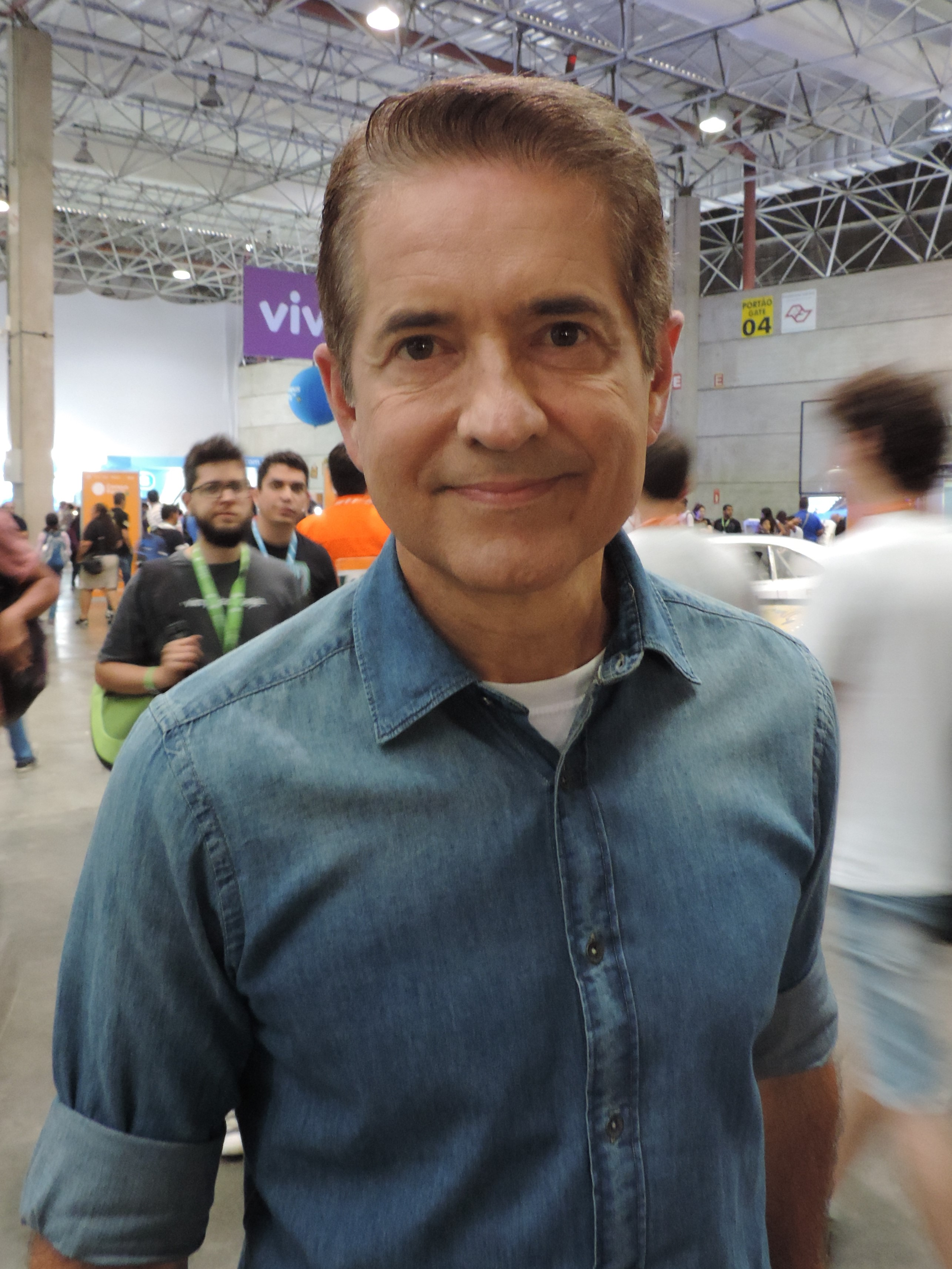 Carlos Tramontina na Campus Party Brasil 2015.